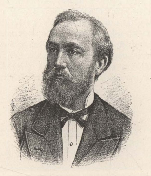 Stühmer Frigyes (1843–1890), cukorka- és csokoládégyáros.